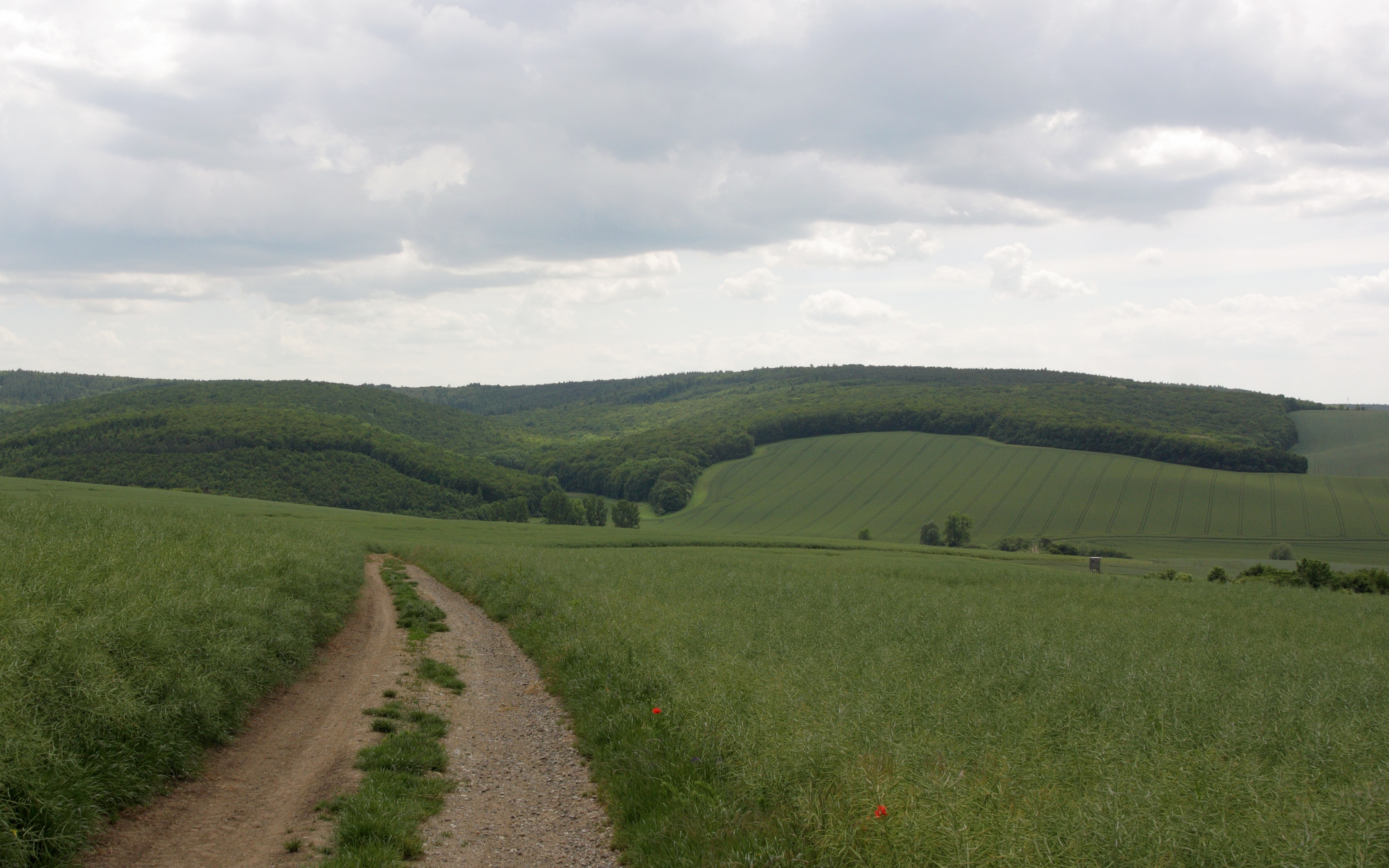 Ždánický les - západní okraj lesa jižně od Kobeřic.